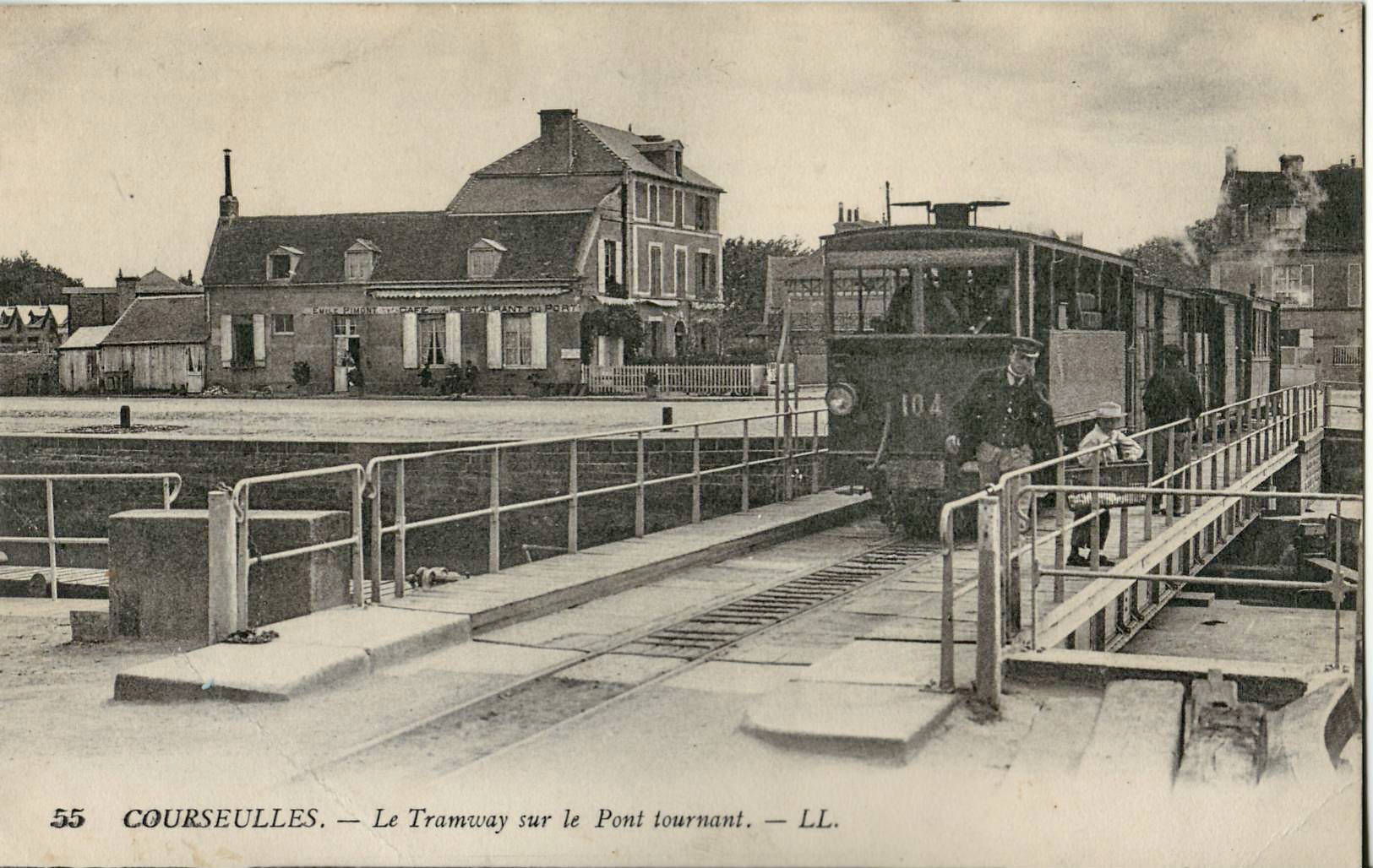 Carte postale ancienne éditée par LL, n°55 :COURSEULLES - Le Tramway sur le Pont tournant.Locotive bicabine 104 des chemins de fer du Calvados